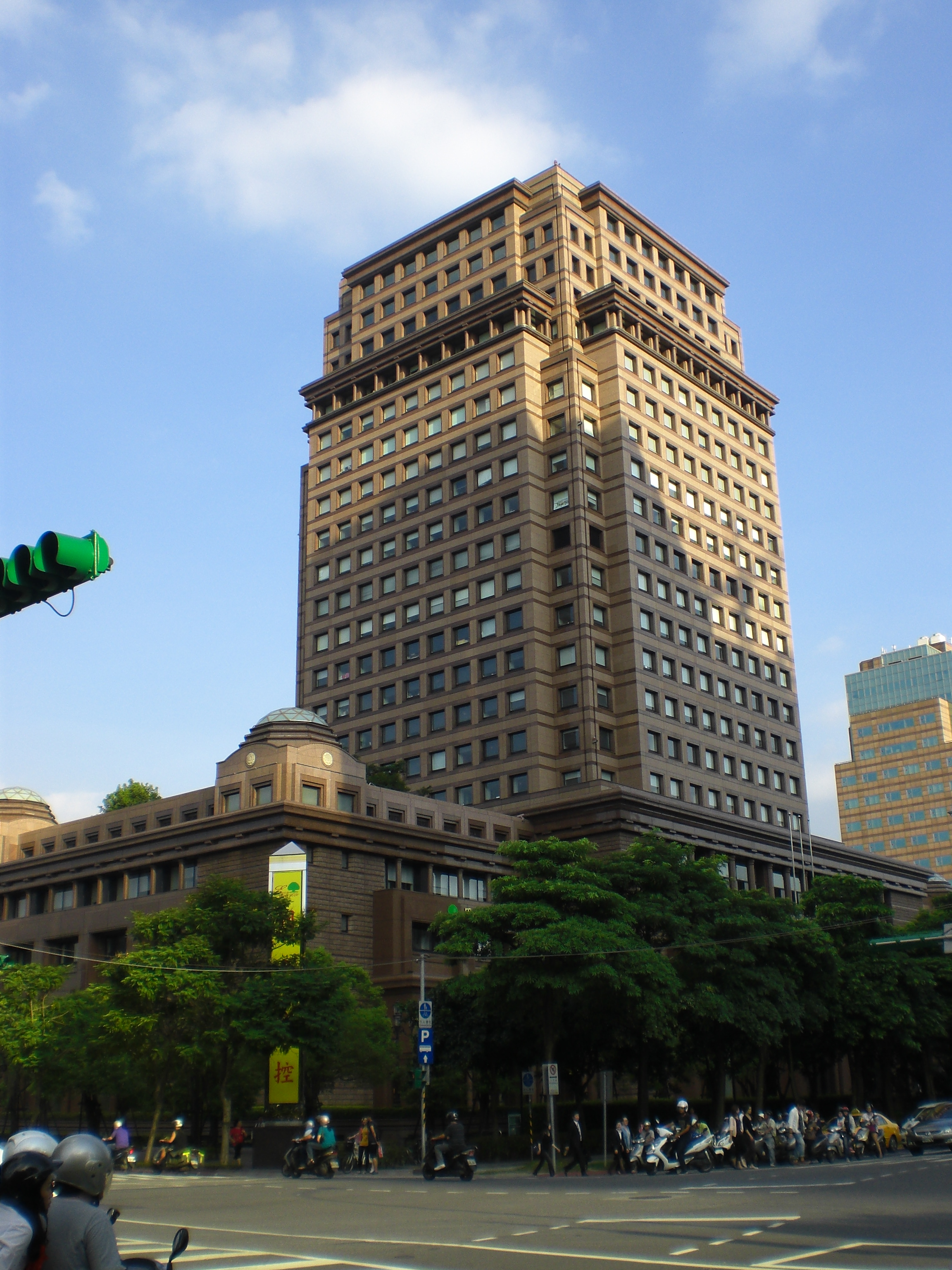 國泰金融中心是國泰世華商業銀行總行所在地，位於臺灣臺北市信義區松仁路7號。